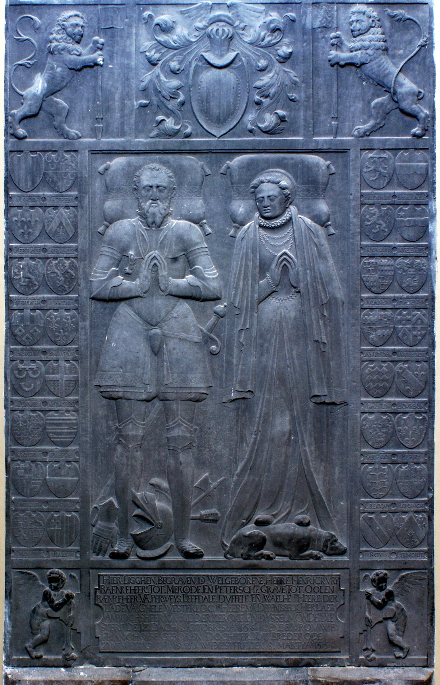 Parochiekerk Sint-Ursula (Lanaken) - Grafmonument van Heer Hendrick de Merode († 1564) en Françoise van Brederode († 1553)